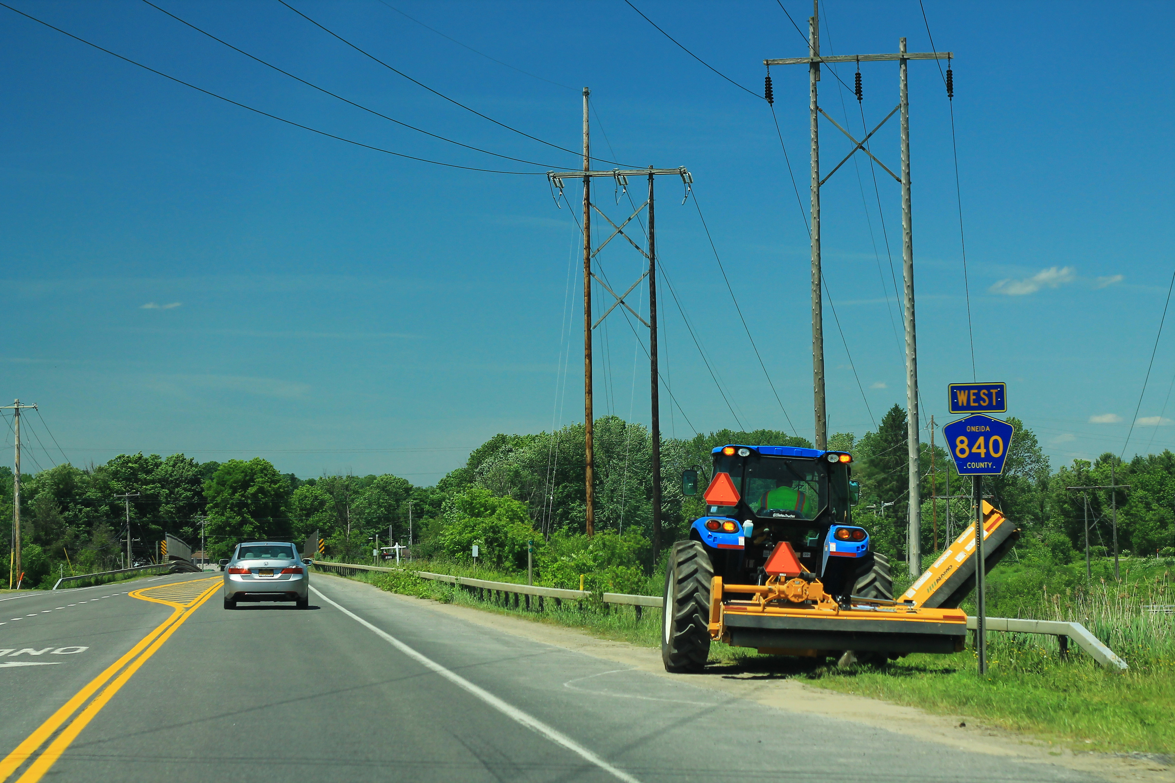 Oneida CR840 West Sign